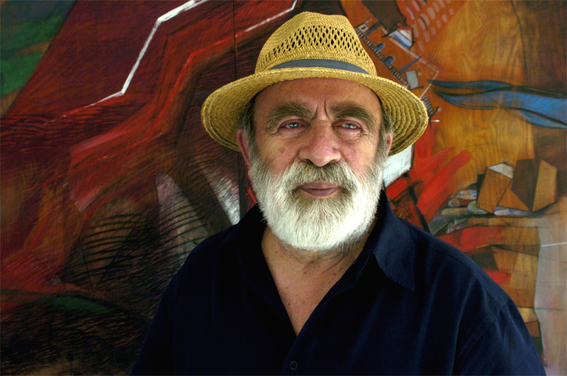 Hernando León. Chile 2007